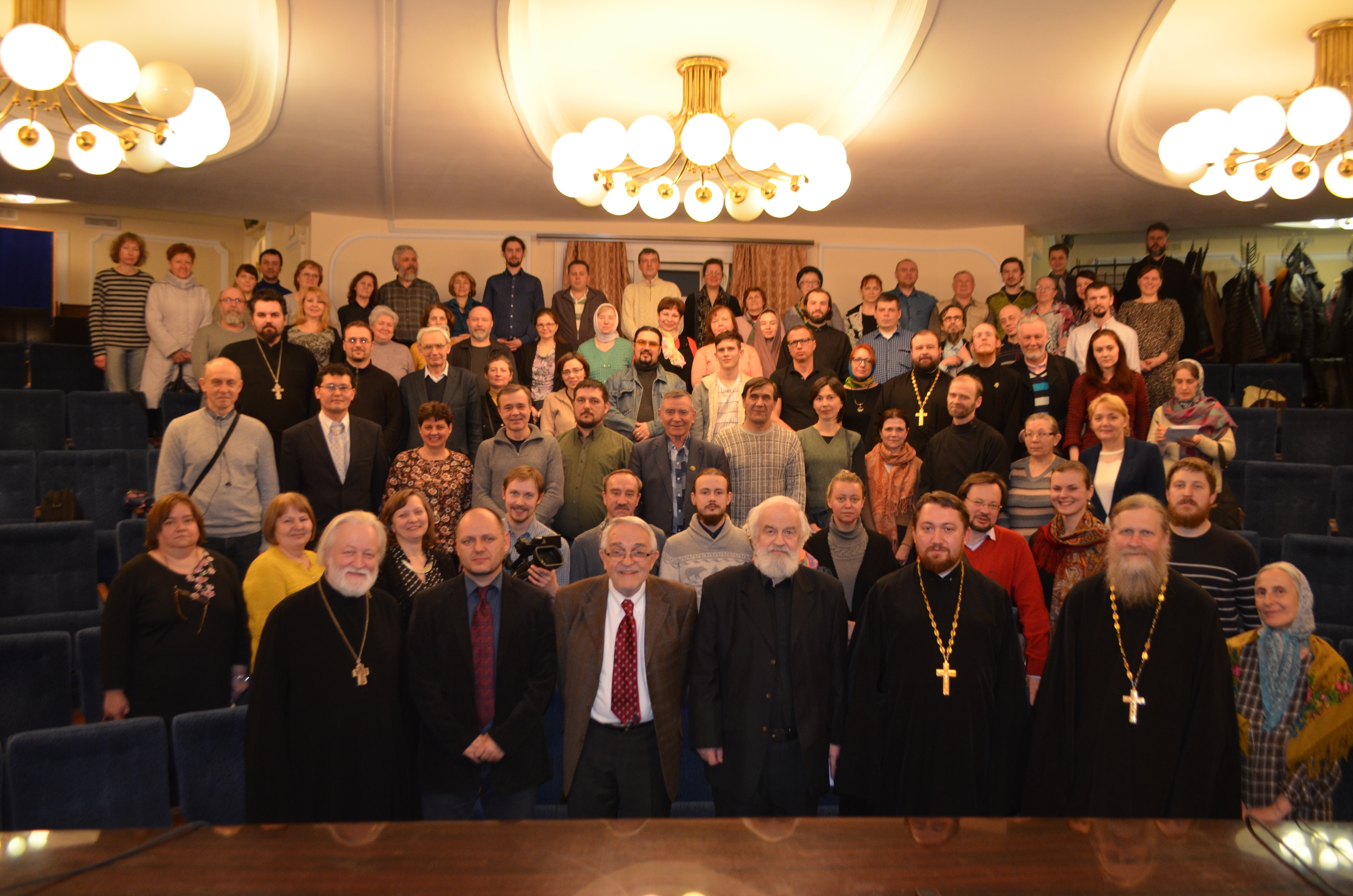 Школа ведущих семейных клубов трезвости